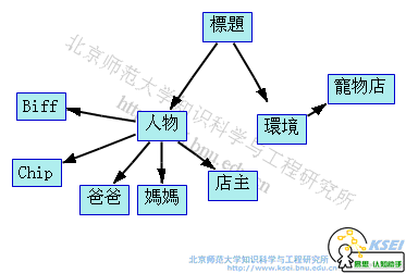 利用易思建構的概念圖，由石添小草於2005年11月10日 (UTC)創作，根據牛津大學出版社的兒童讀物“The Pet Shop”的故事大綱而繪畫的概念圖。